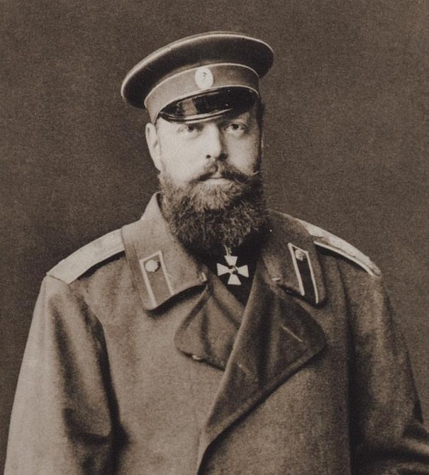 Alejandro III de Rusia